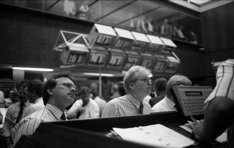 Juni 1988 Frankfurt am Main Börse, mit Informationssystem "Kiss"